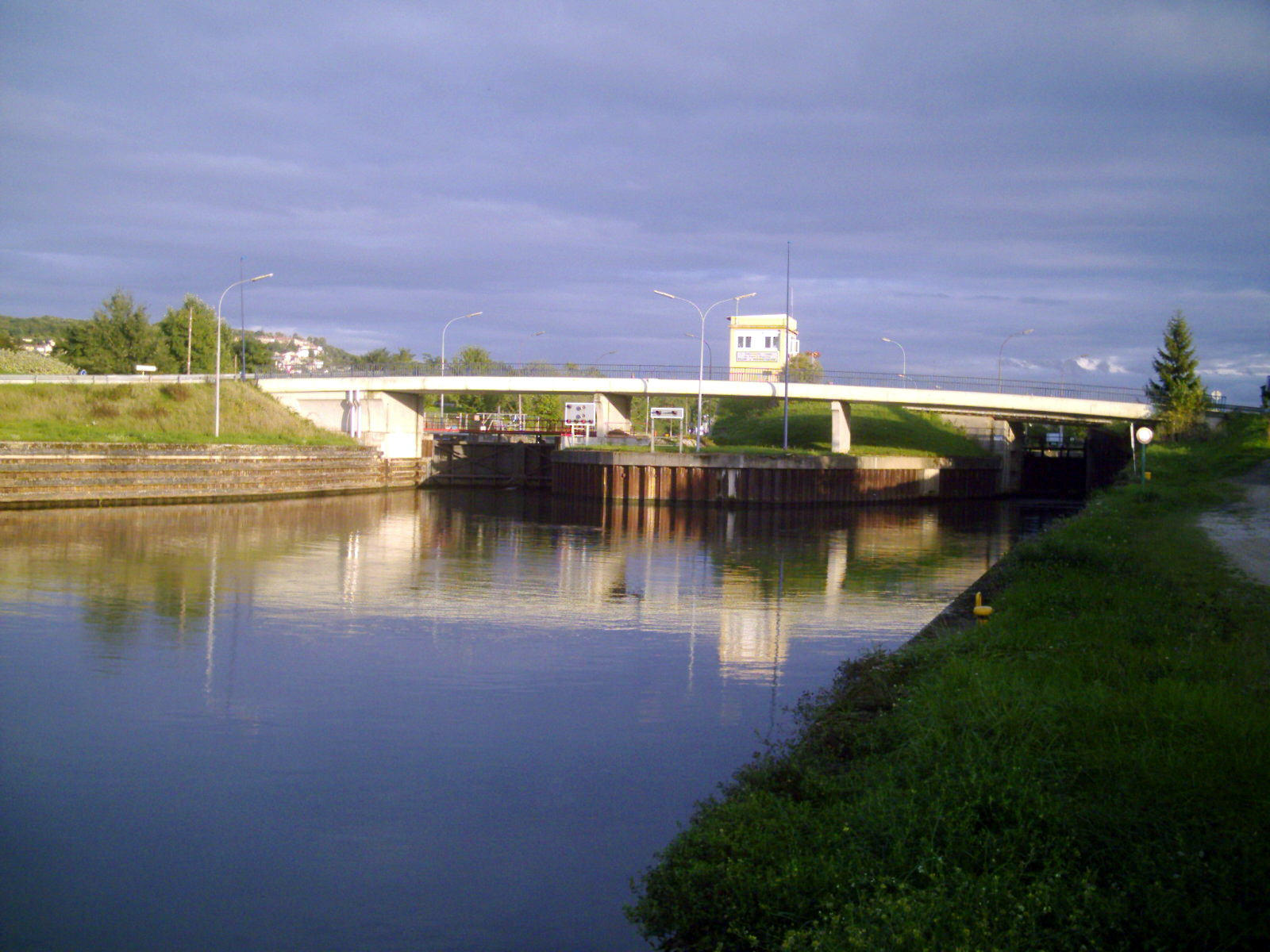 Frouard: écluse grand gabarit